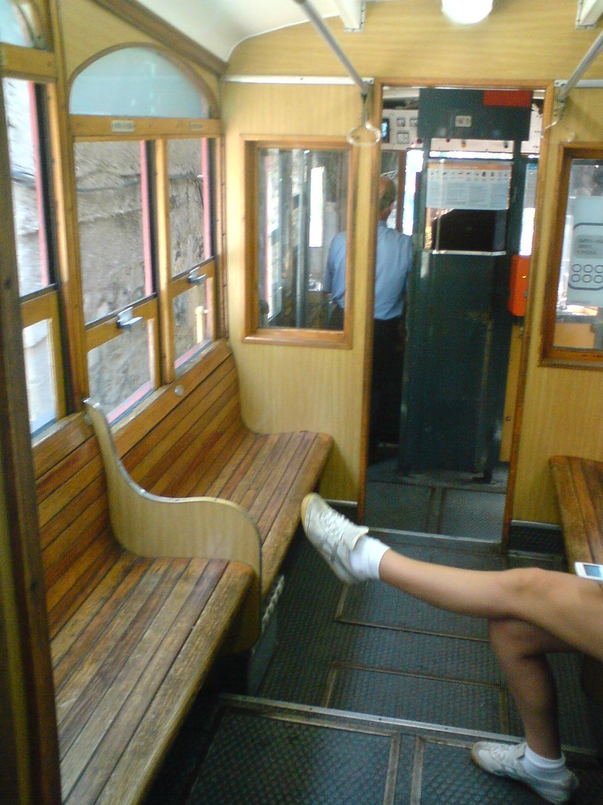 Innenansicht des einzigen Wagens der Bahn in Genua-Principe